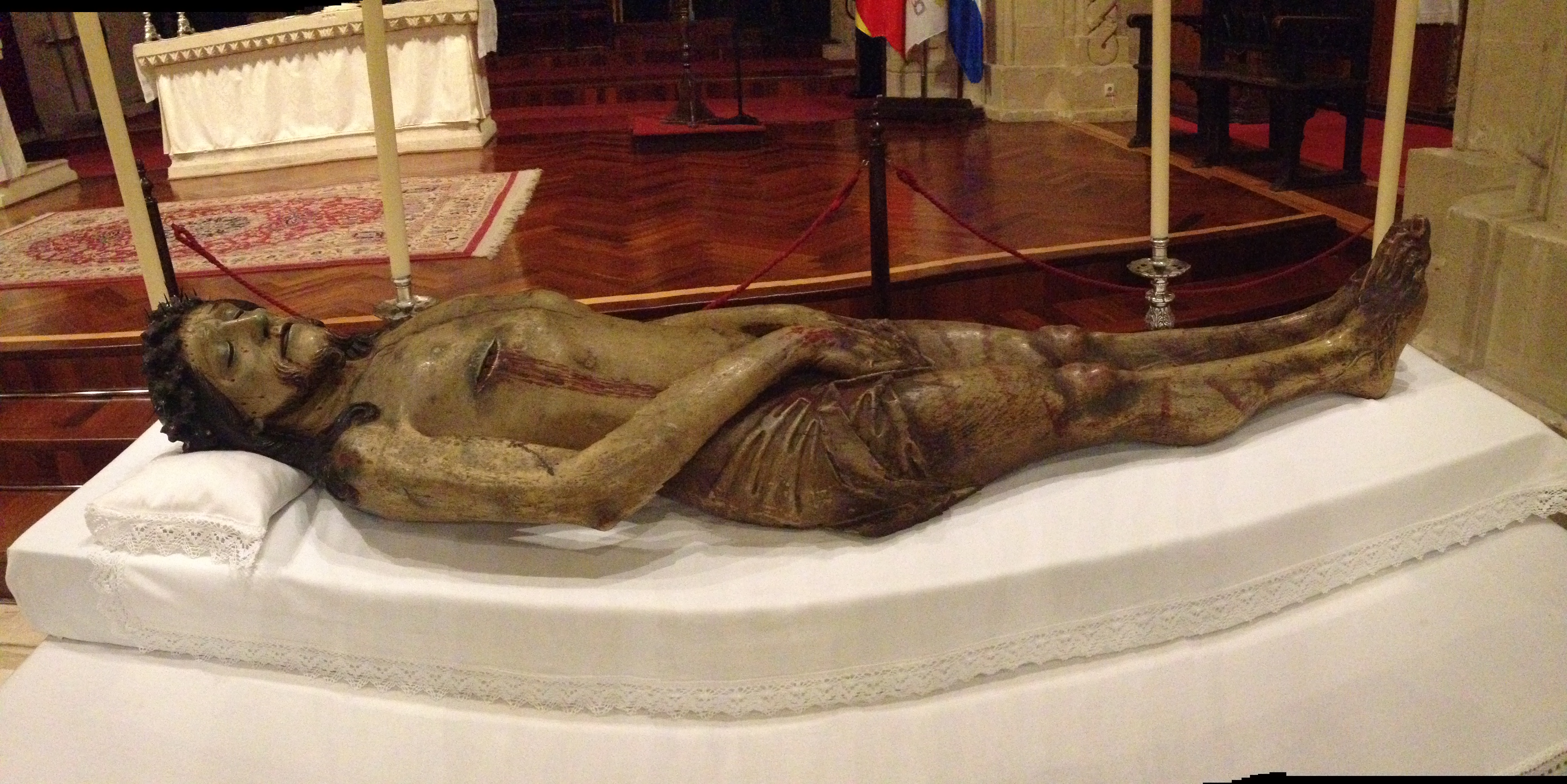 Cristo yacente, con el nombre de las Aguas, por ser una imagen de rogativas para la lluvia. Mediados de siglo XV